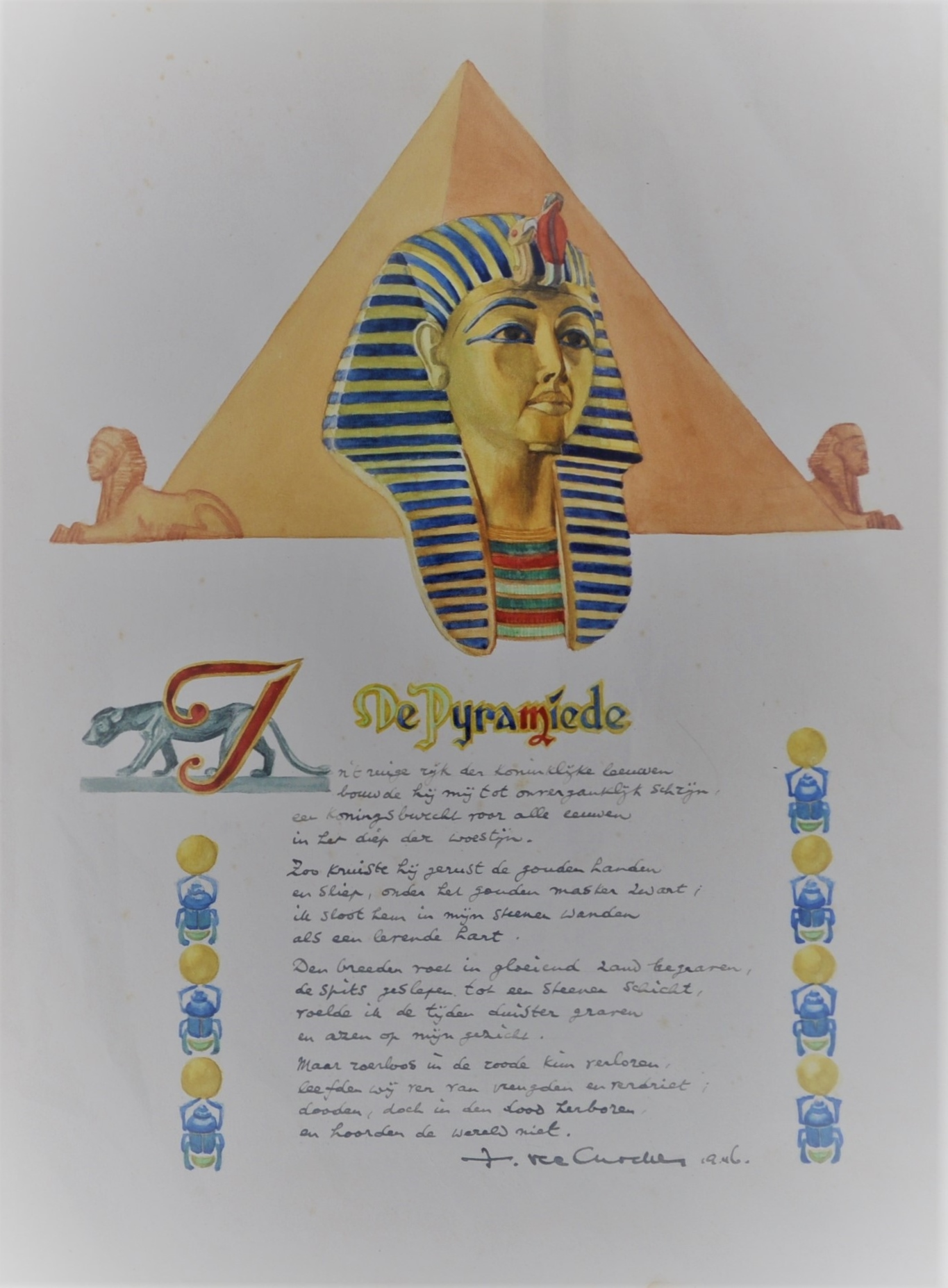 Ferdinand Vercnocke, De Pyramiede, waterverftekening